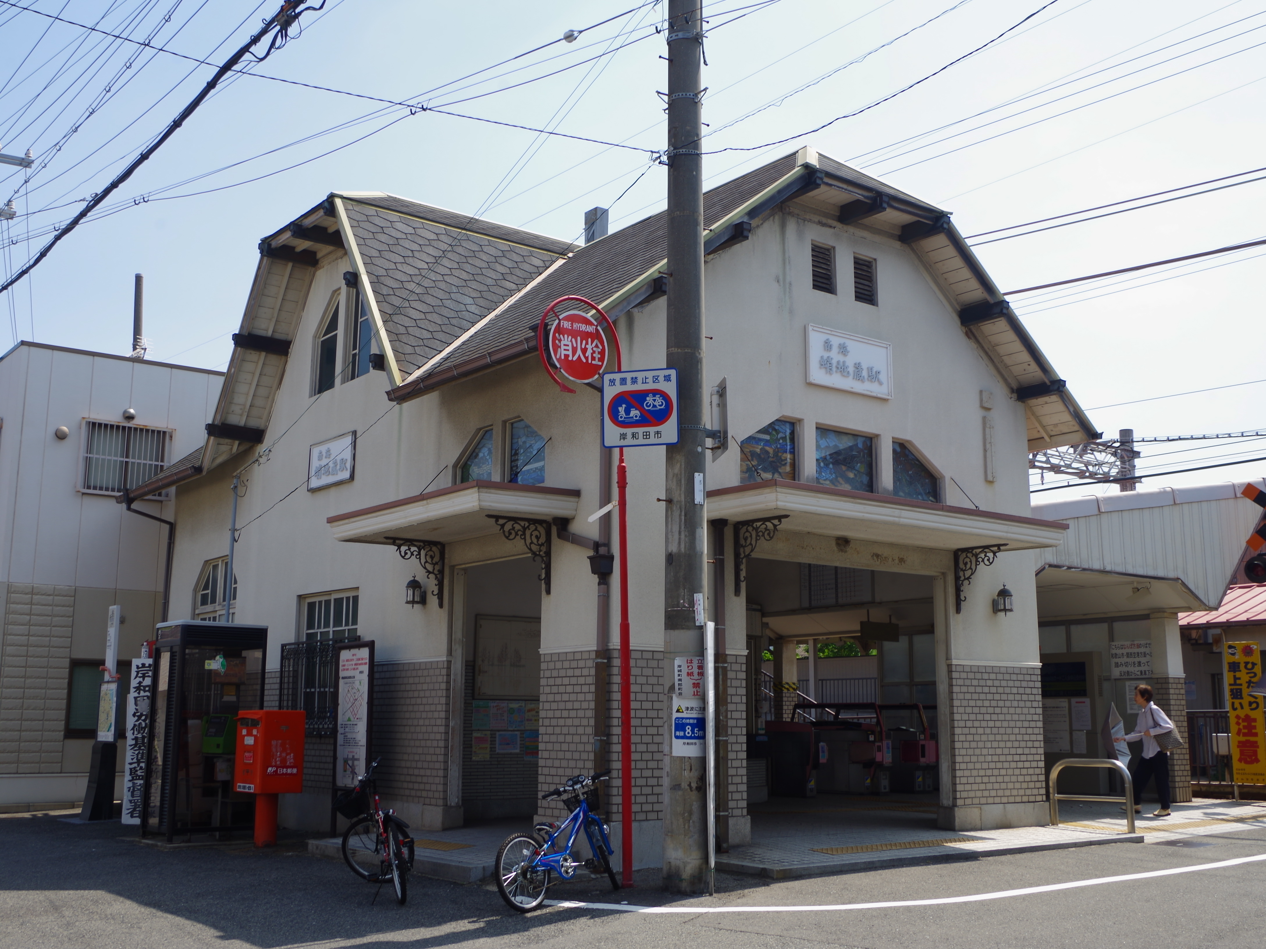 南海本線 蛸地蔵駅 Takojizō station 2013.8.29